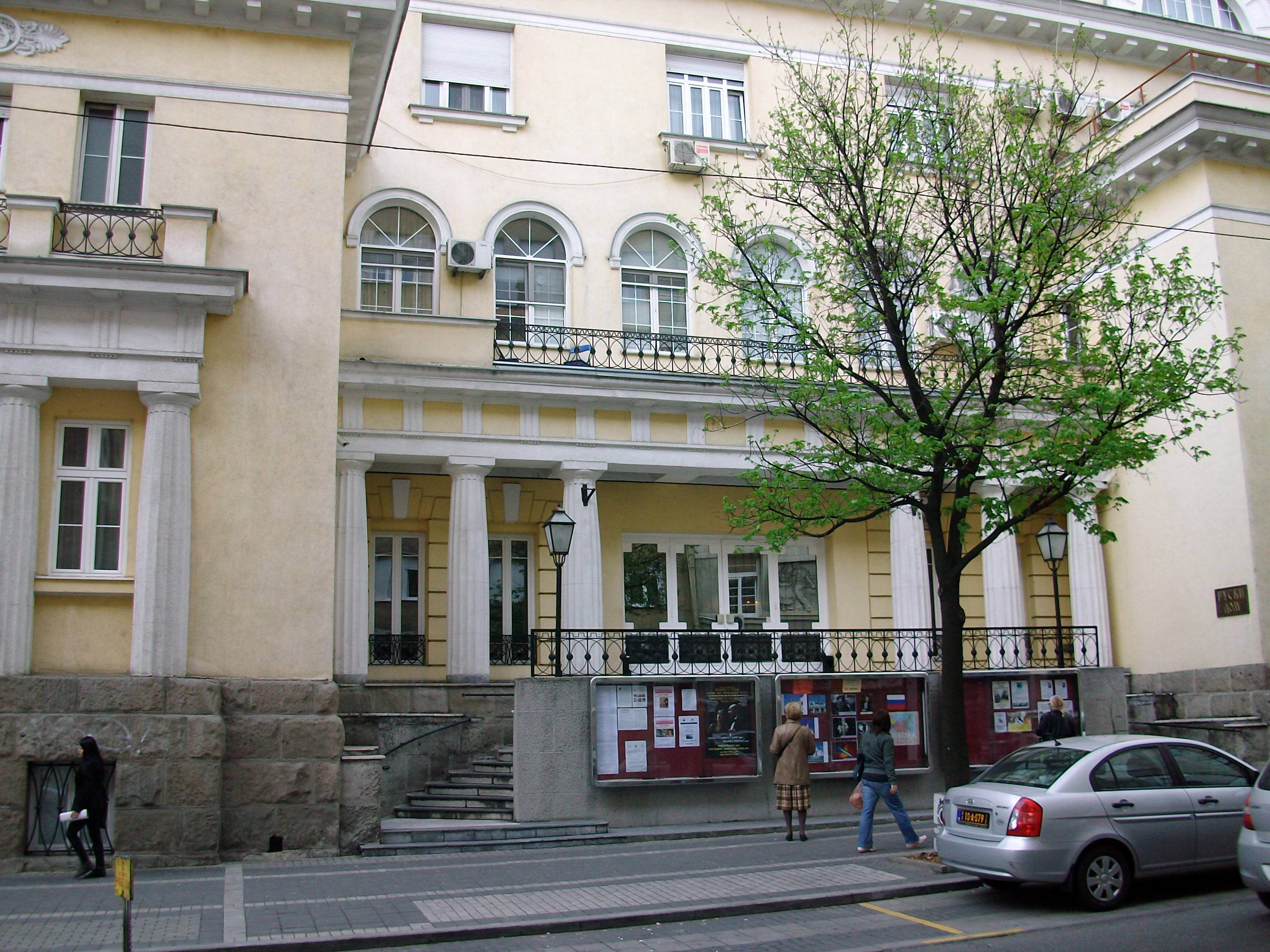 Руски дом у Београду / Russian home in Belgrade Vasily Baumgarten (1879–1962) Alternative namesRussian: Василий (Вильгельм) Фёдорович БаумгартенDescriptionRussian architectDate of birth/death30 October 1879 (17 October 1879 in Julian calendar)13 May 1962Location of birth/deathSaint Petersburg, RussiaBuenos Aires, ArgentinaWork locationSaint Petersburg, Belgrade etc.Authority control : Q20771008